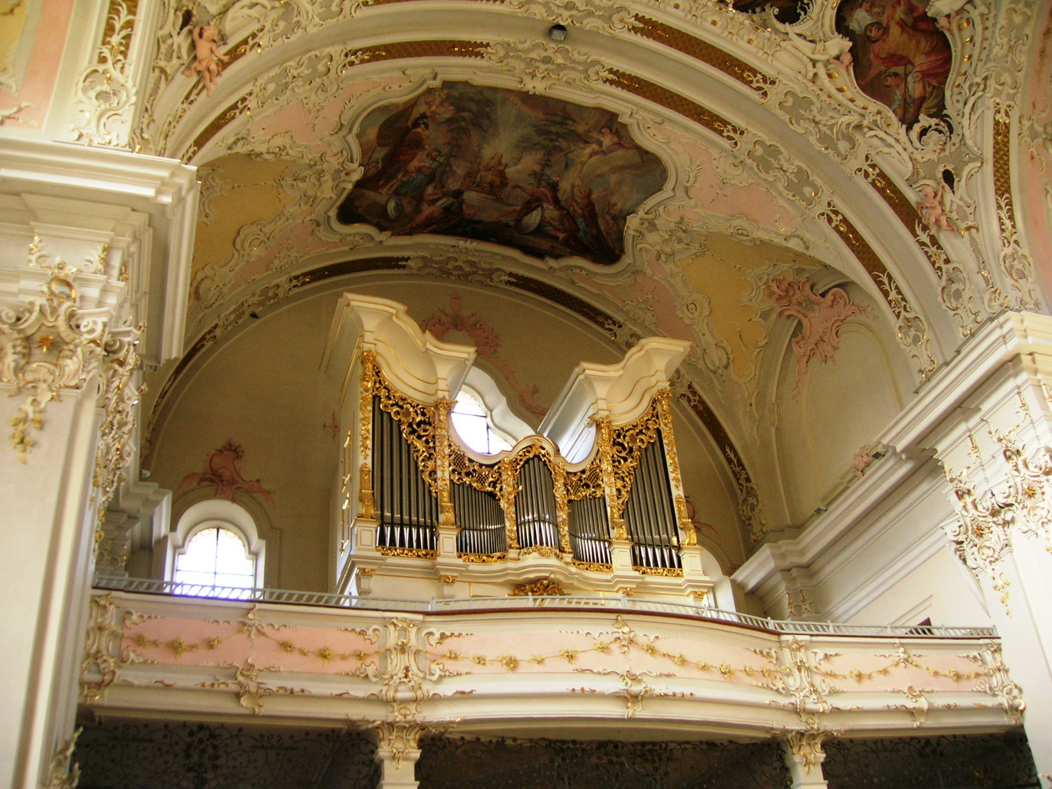 La basilica di Wilten a Innsbruck